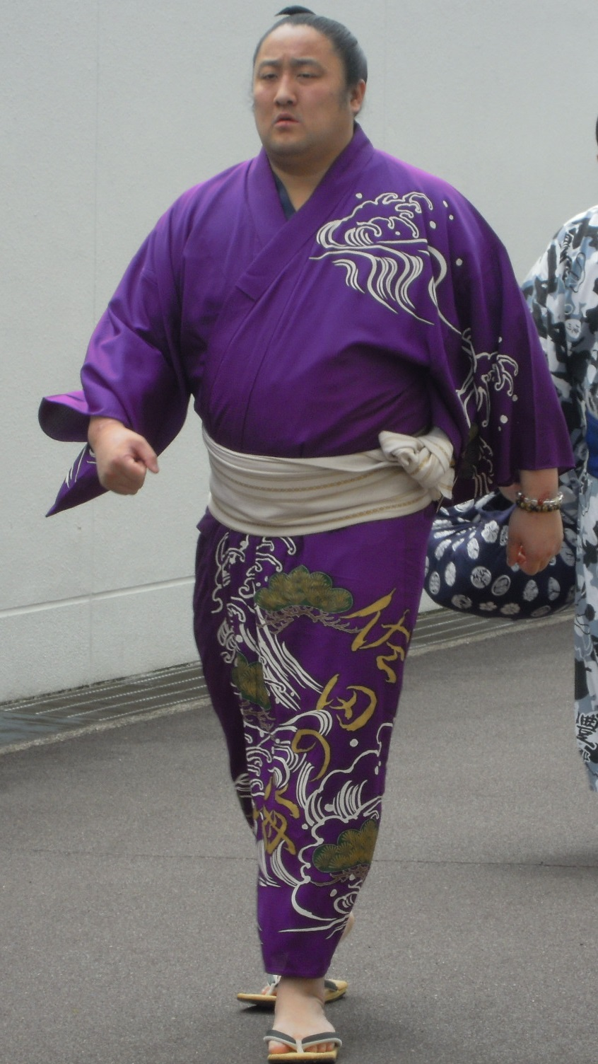 平成26年五月場所3日目、国技館入りする佐田の海関